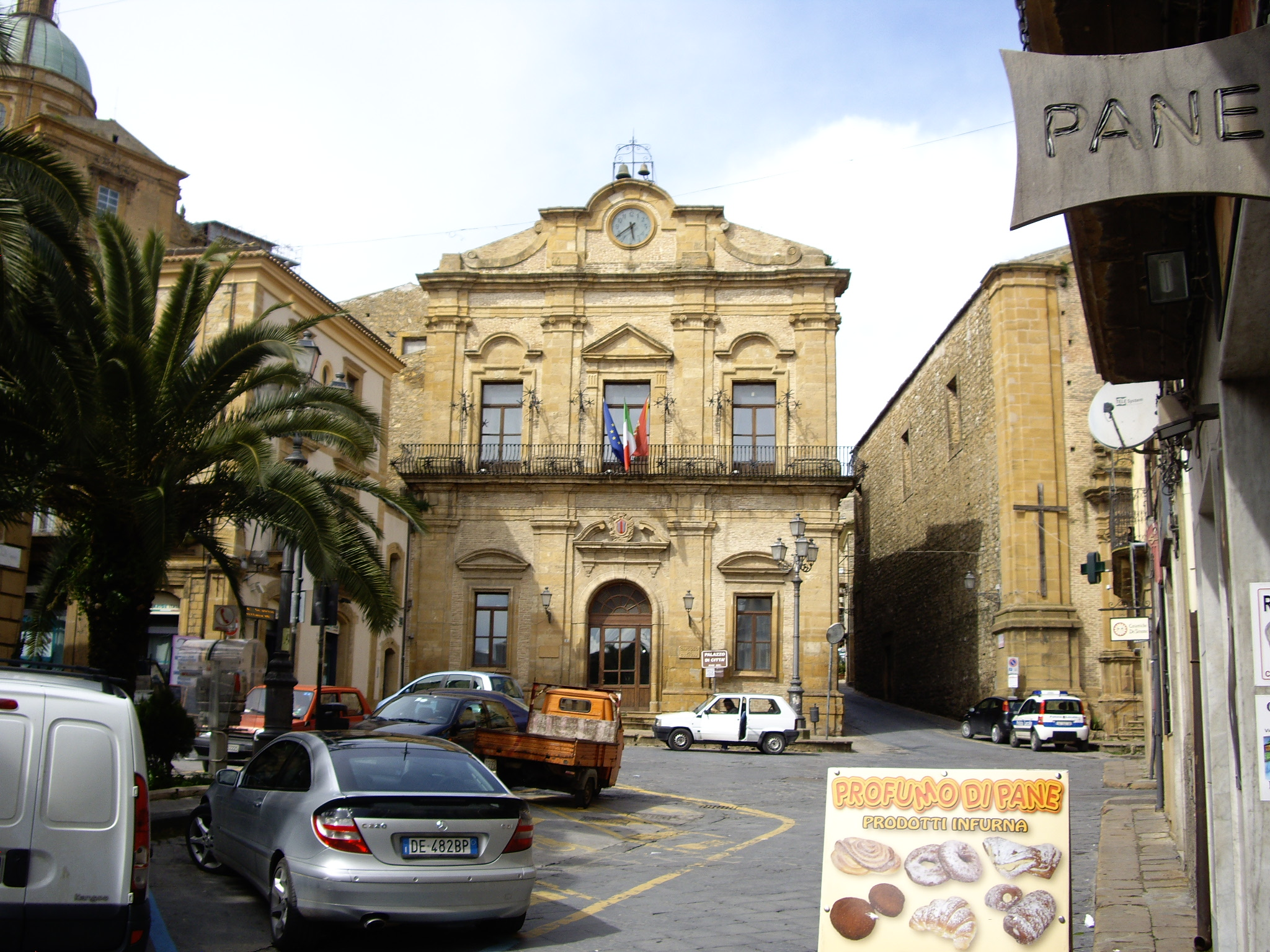 Piazza Armerinako udaletxea